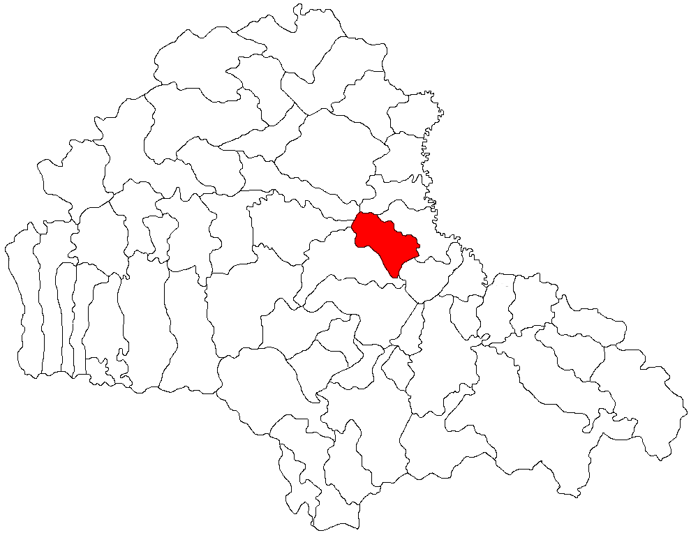 Categorie:Hărţi ale judeţului Braşov